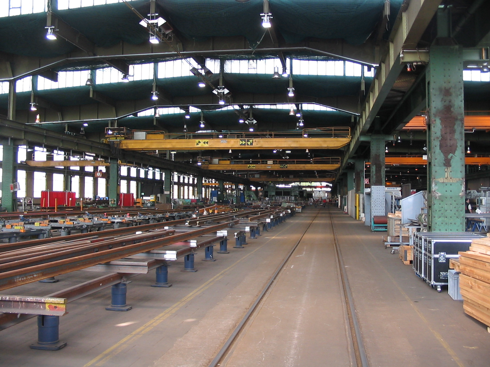 Weichenwerk Witten/DB Werk Oberbaustoffe Witten: Weichenrichthalle